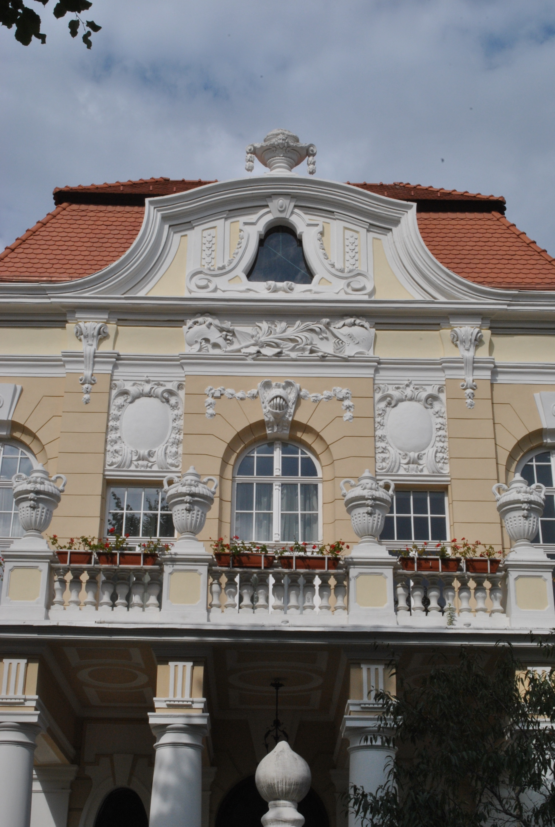 Rectoratul Universității "Lucian Blaga" sf. sec. XIX